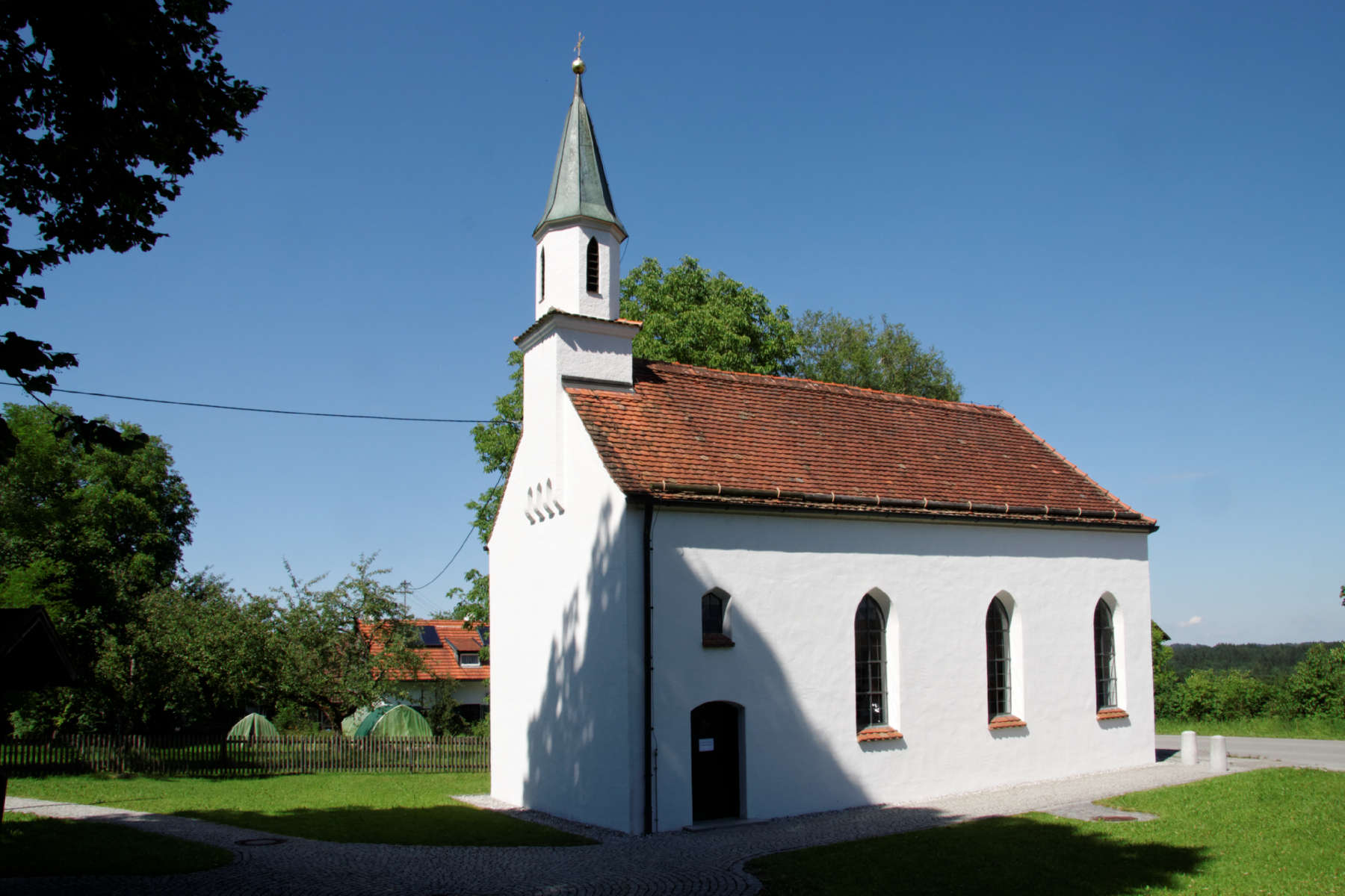 Schwaigen, St. Wolfgang in Grafenaschau